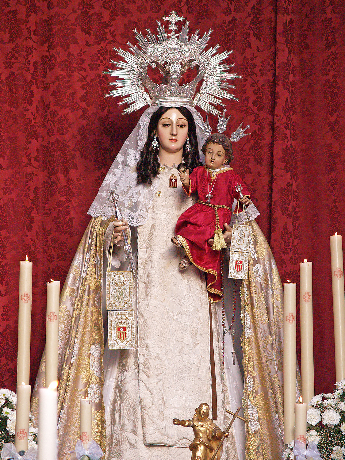 Altar efímero de Ntra. Sra. de las Mercedes, instalado con motivo de la Procesión Eucarística de la Parroquia de San Francisco.